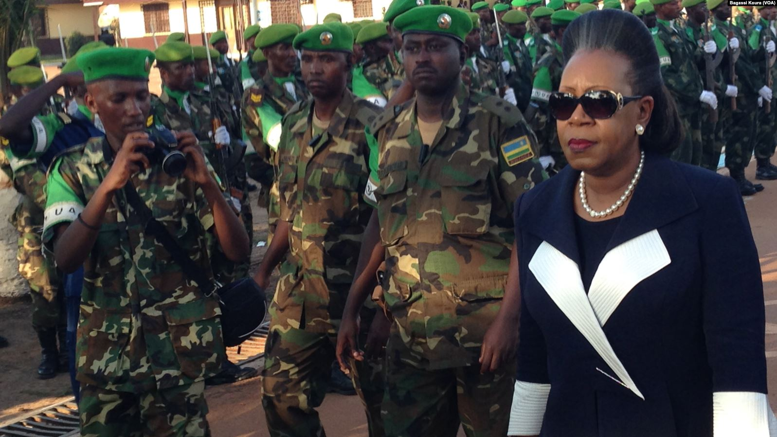 La présidente de la Transition centrafricaine Catherine Samba-Panza rend hommage aux troupes de l’Union Africaine, le 13 septembre 2014 au camp Mpoko de Bangui, RCA. Cérémonie en hommage aux troupes africaines par la Présidente de la Transition centrafricaine Catherine Samba-Panza